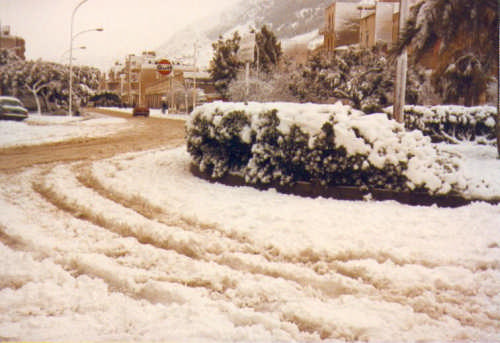 Piano Santa Maria - La nevicata dell'8 gennaio 1981